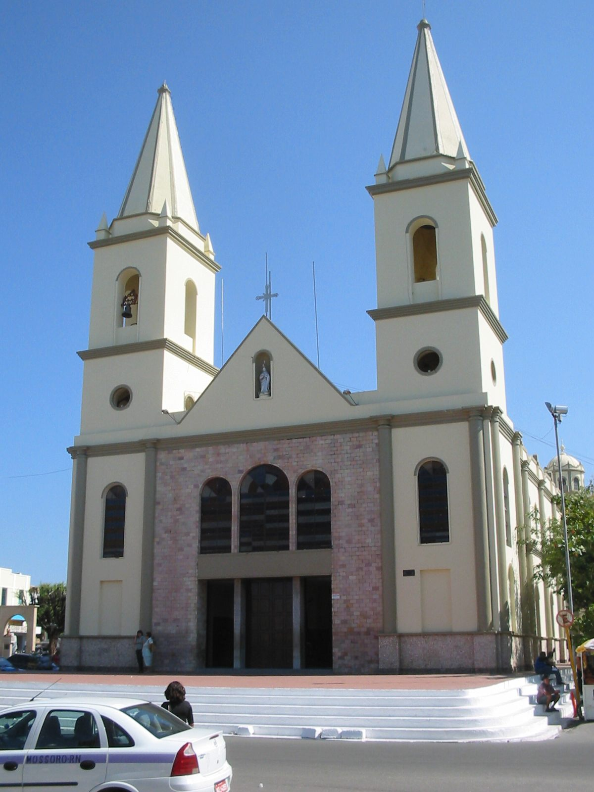 Mossoró (Rio Grande do Norte), Brasil. Catedral de Santa Luzia. Cathedral of Santa Luzia. Mossoró (Rio Grande do Norte), Brazil.